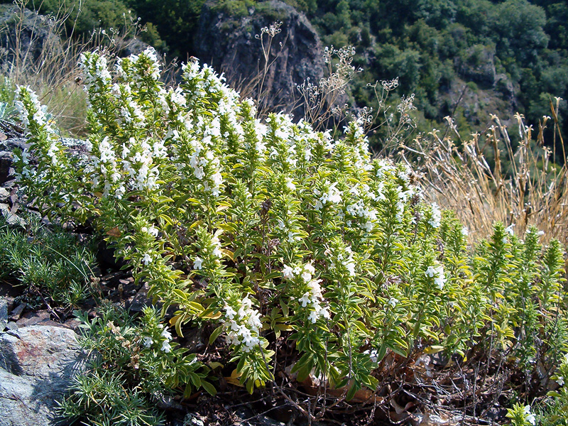 Балканска чубрица Satureja sp.